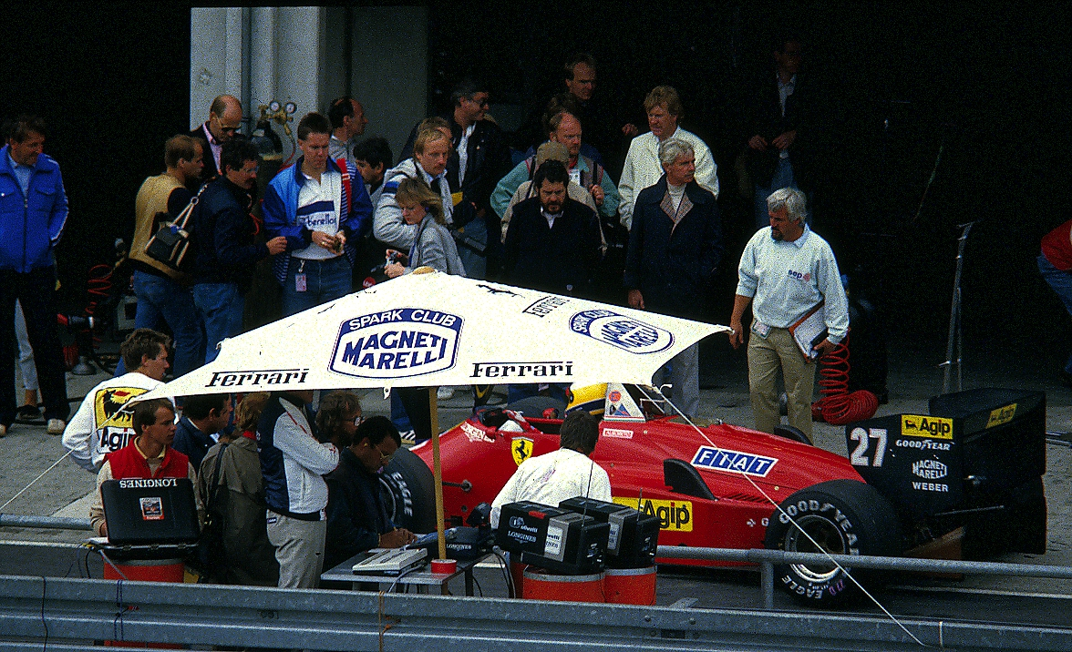 Michele Alboreto während des Trainings zum Großen Preis von Deutschland 1985 auf dem Nürburgring an der Box, Ferrari 156/85